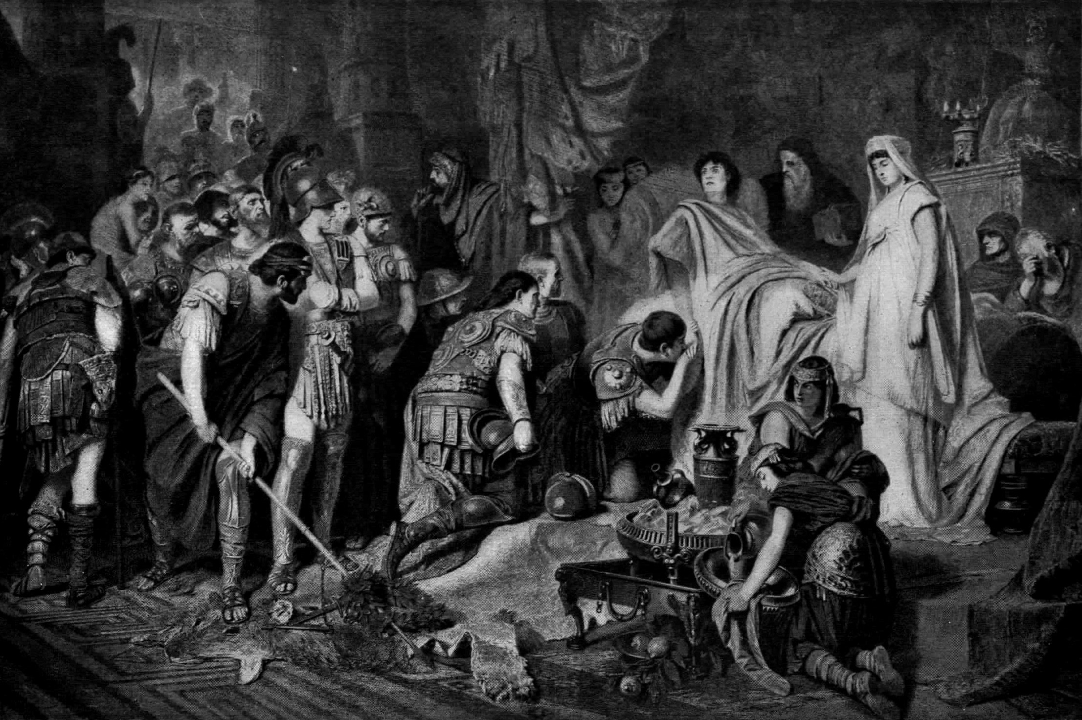 Alexander old drawings